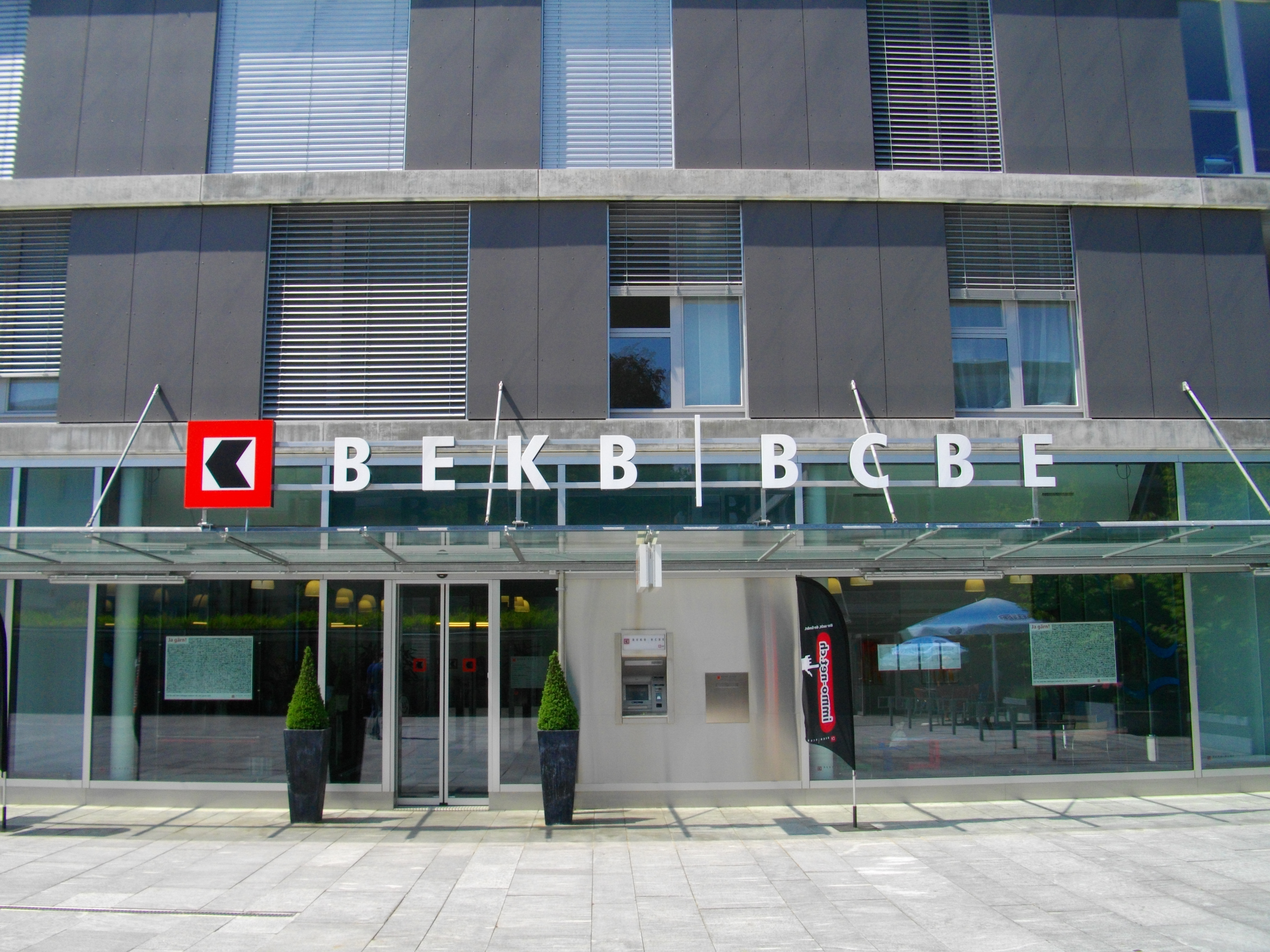 Oficina del Banco Cantonal Bernés en Muri bei Bern